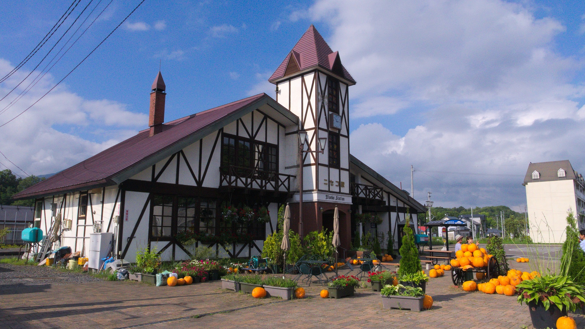 ニセコ駅 駅舎